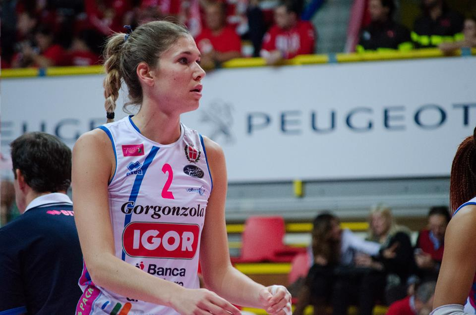 Pallavolista statunitense, gioca nel ruolo di schiacciatrice